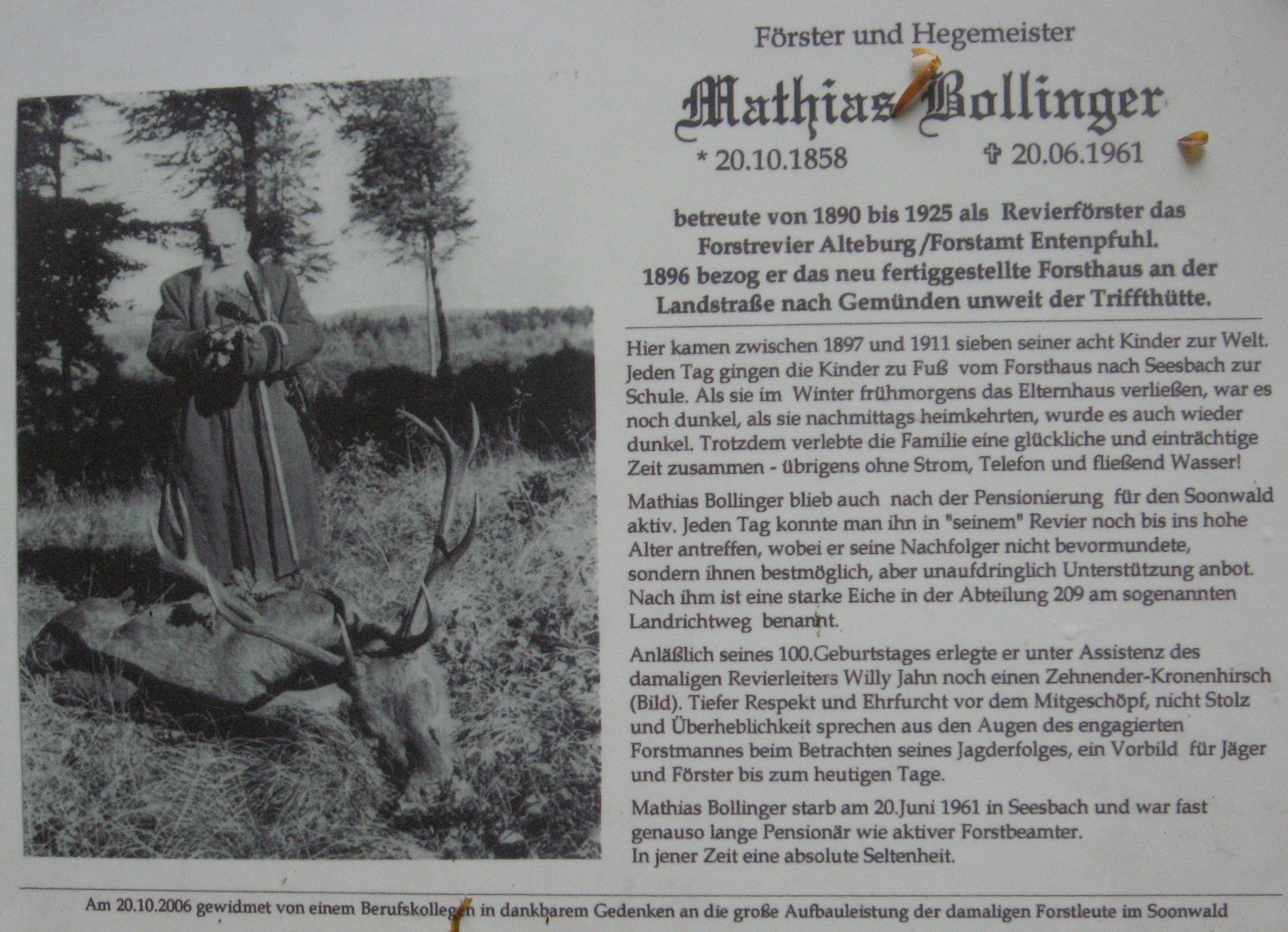 Infotafel Hegemeister Mathias Bollinger am Aussichtsturm Alteburg